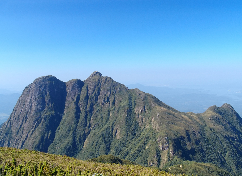 O conjunto do Pico Paraná, visto do Caratuva, em Julho de 2006.